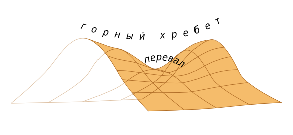 Перевал